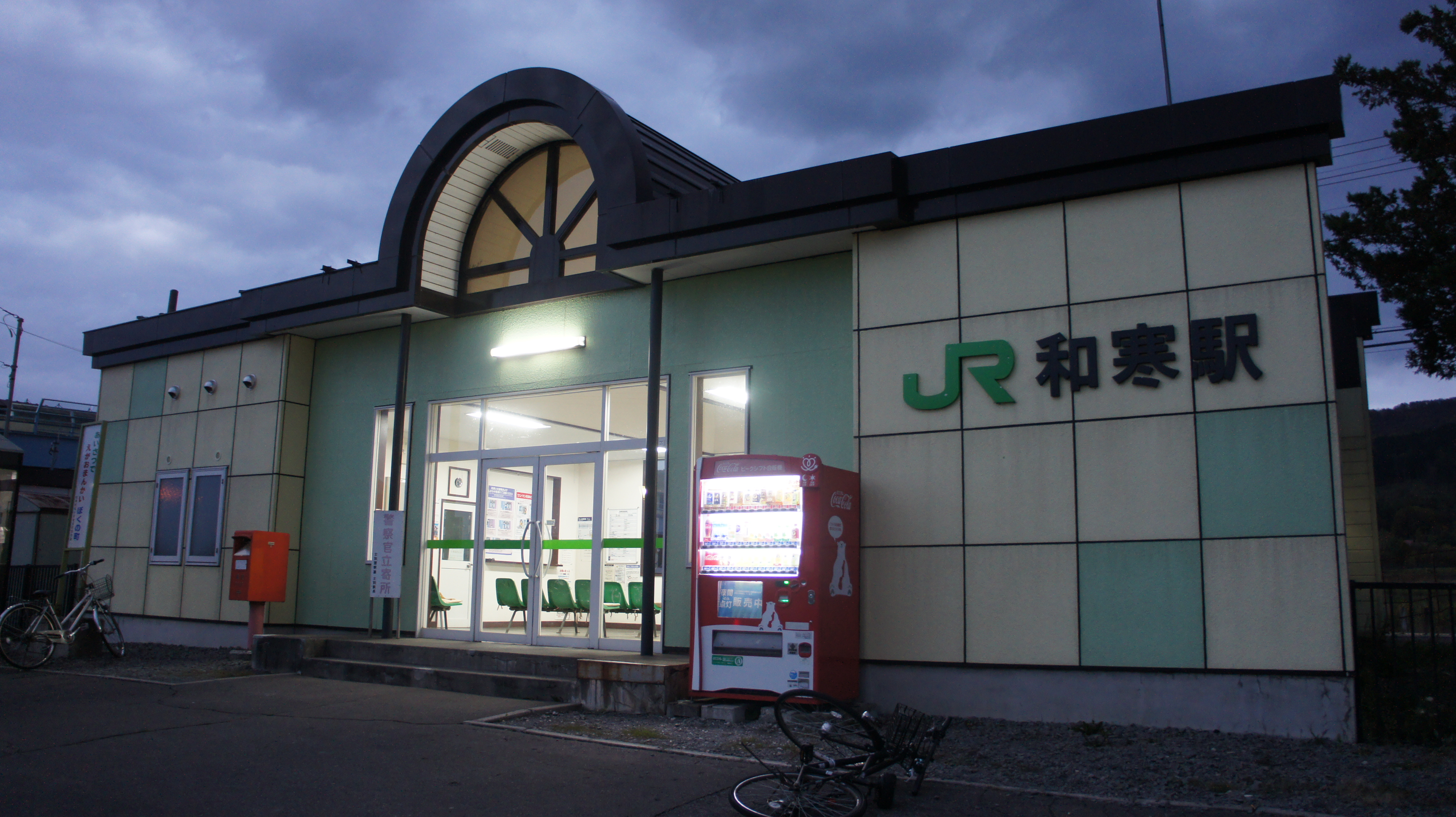 JR宗谷本線・和寒駅の駅舎 Sony NEX-3